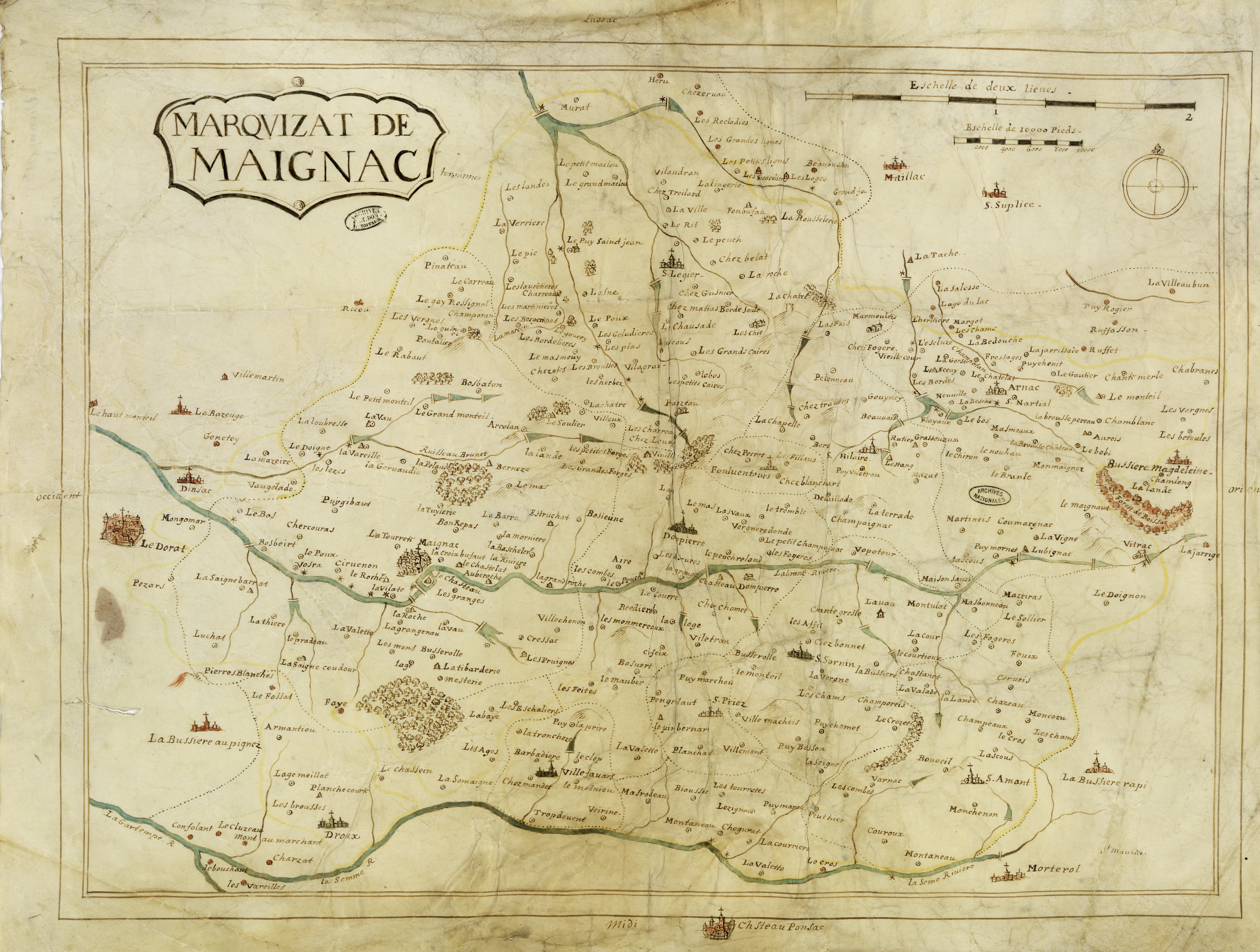 Vallées de la Bramme, entre Saint-Maurice-la-Souterraine et Le Dorat, et de la Semme, entre Morterolles (Bessines-sur-Gartempe) et le confluent avec la Gartempe (Archives nationales, N/III/Haute-Vienne/5)